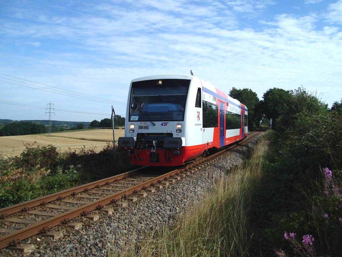 Triebwagen der Citybahn bei Niederwürschnitz (Bahnstrecke Stollberg–St. Egidien)